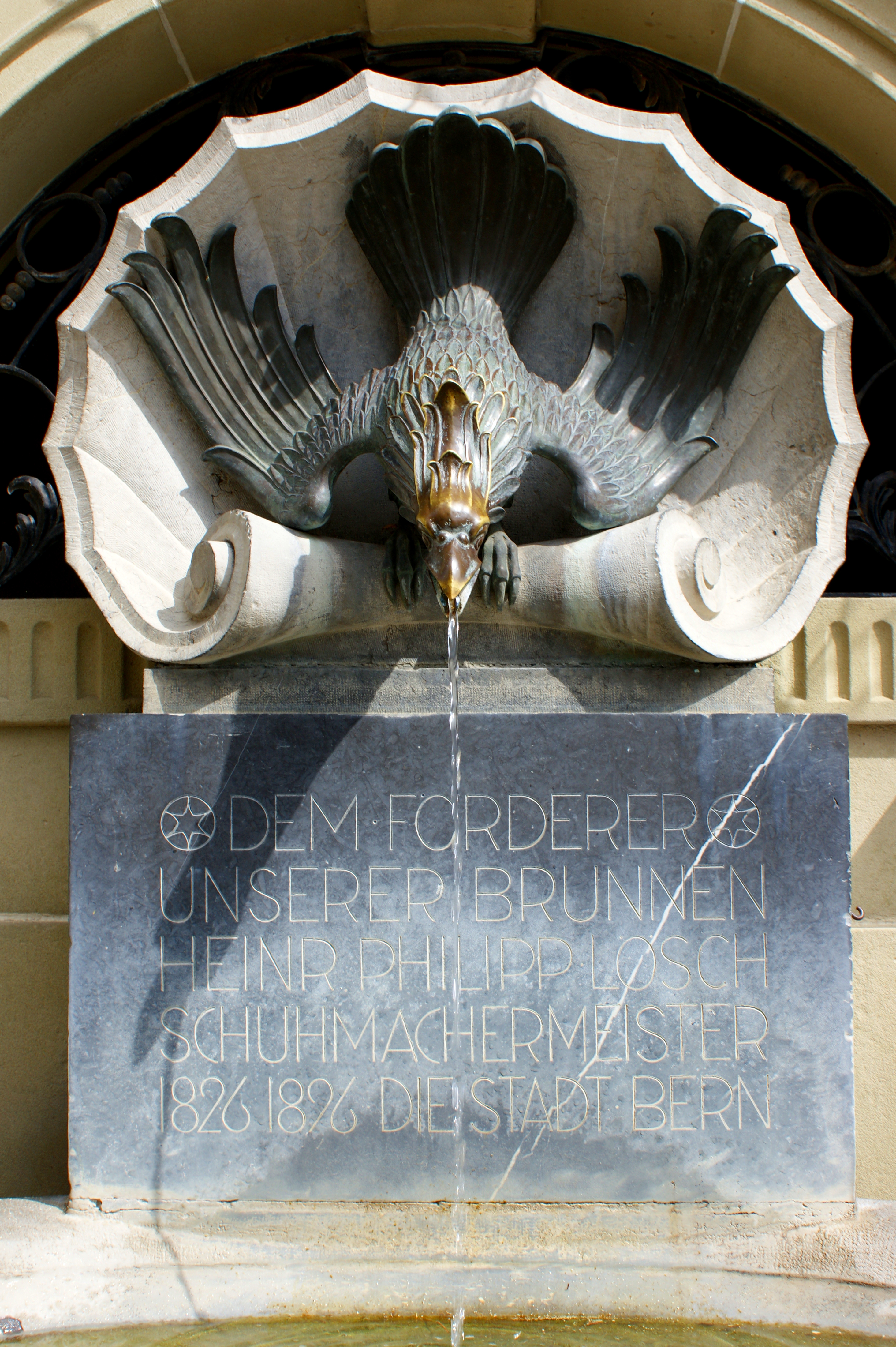 Brunnenfigur und Widmungstafel Lösch-Brunnen